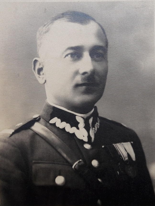 Bronisław Sapeta w roku 1934 - mjr lek. wet., wykładowca hippologii w Szkole Podchorążych dla Podoficerów w Bydgoszczy. We wrześniu 1939 r. szef służby weterynaryjnej w 15 Dywizji Piechoty